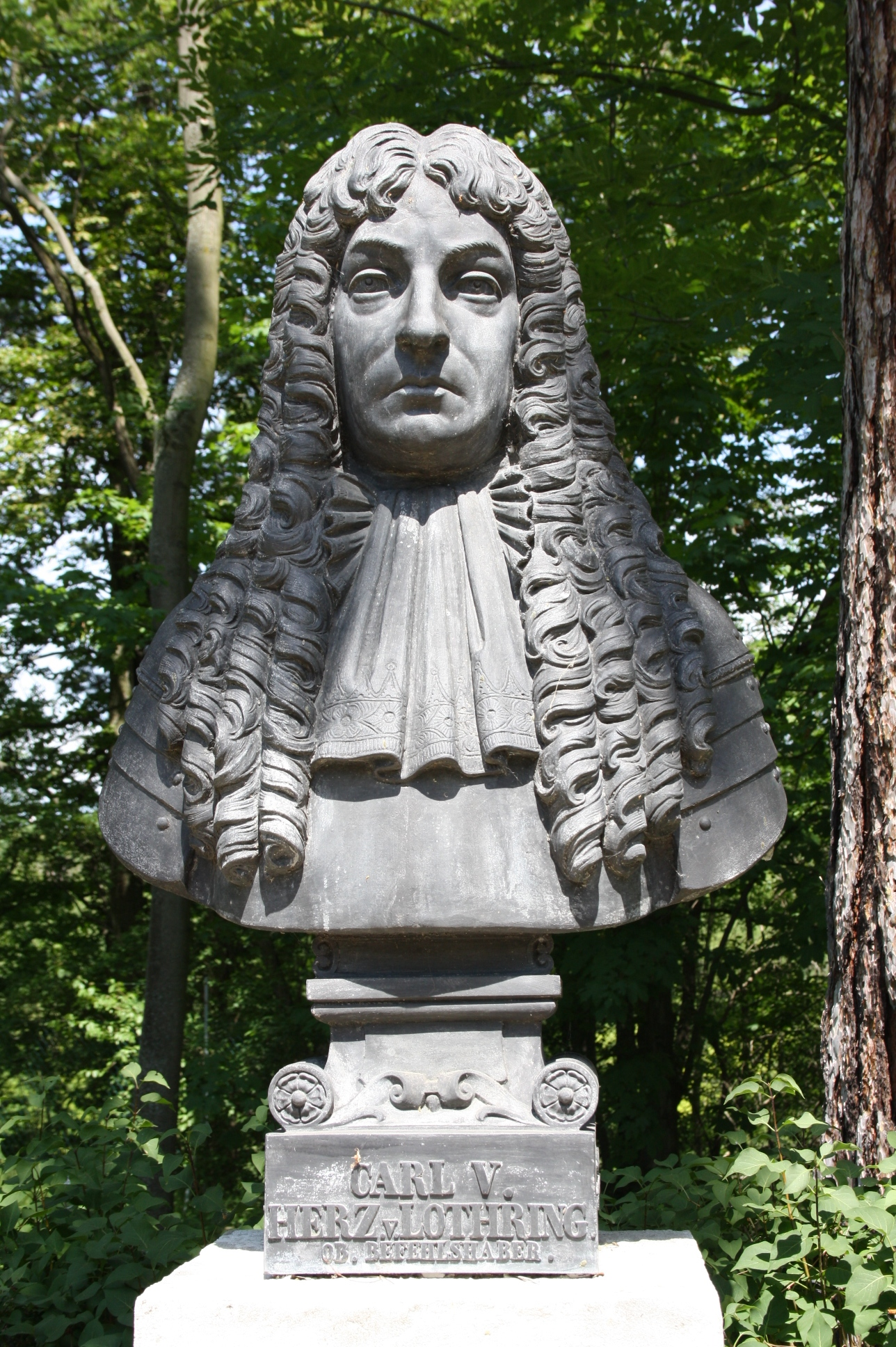 Büste in der Gedenkstätte Heldenberg (Niederösterreich)